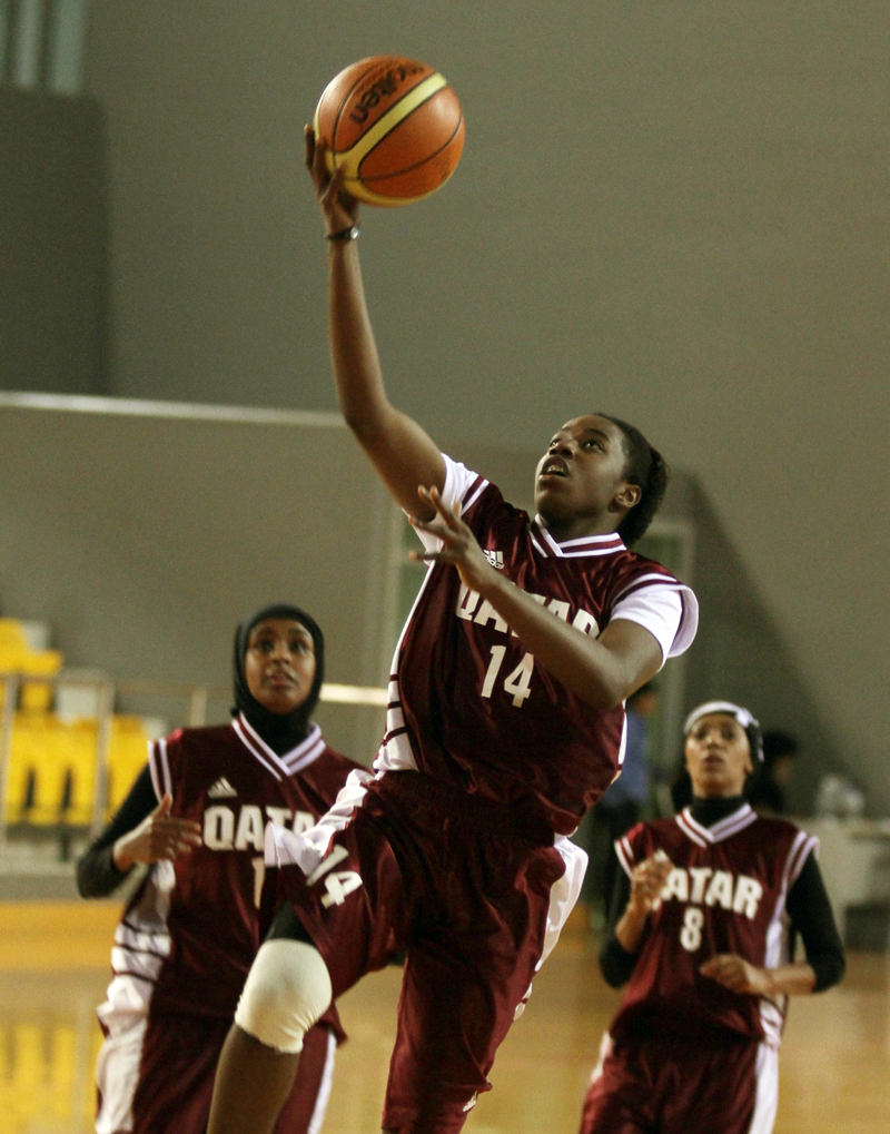 la basketteuse qatarie Warda Murgan score dans une rencontre amicale entre l'équipe du Qatar et l'équipe de l'ambassade américaine.